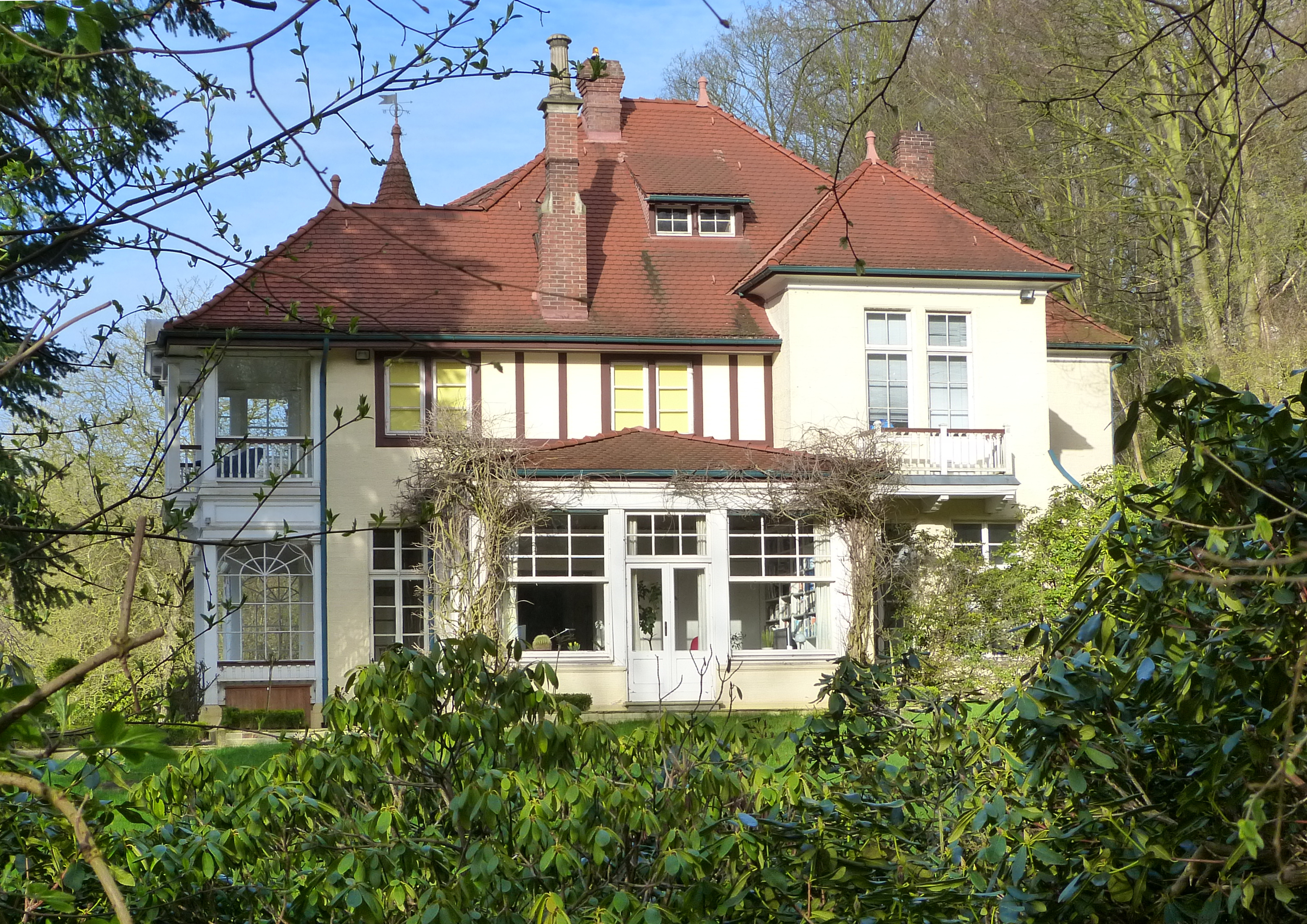 Haus Schwalbenklippe in Bremen, Admiral-Brommy-Weg 5Das abgebildete Objekt ist ein geschütztes Kulturdenkmal in der Freien Hansestadt Bremen, mit der Nr. 1244 beim Landesamt für Denkmalpflege registriert.